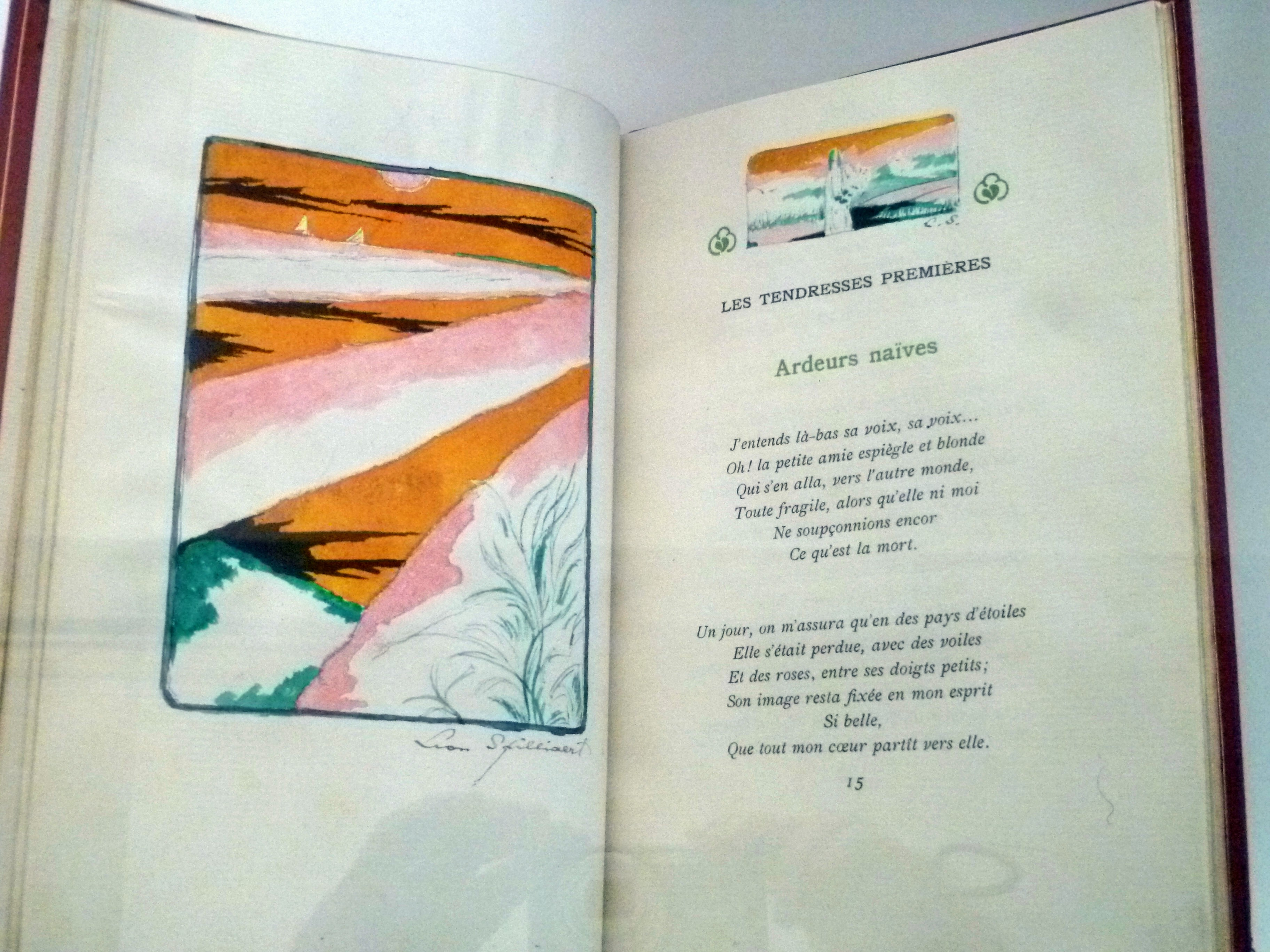 "Zee en strand" in "Toute la Flandre" (Emile Verhaere, 1917) met illustraties door de Belgische kunstschilder Léon Spilliaert (1881-1946); Oost-Indische inkt, penseel, pen, kleurpotlood, aquarel op papier; Koninklijke Bibliotheek, Brussel, België